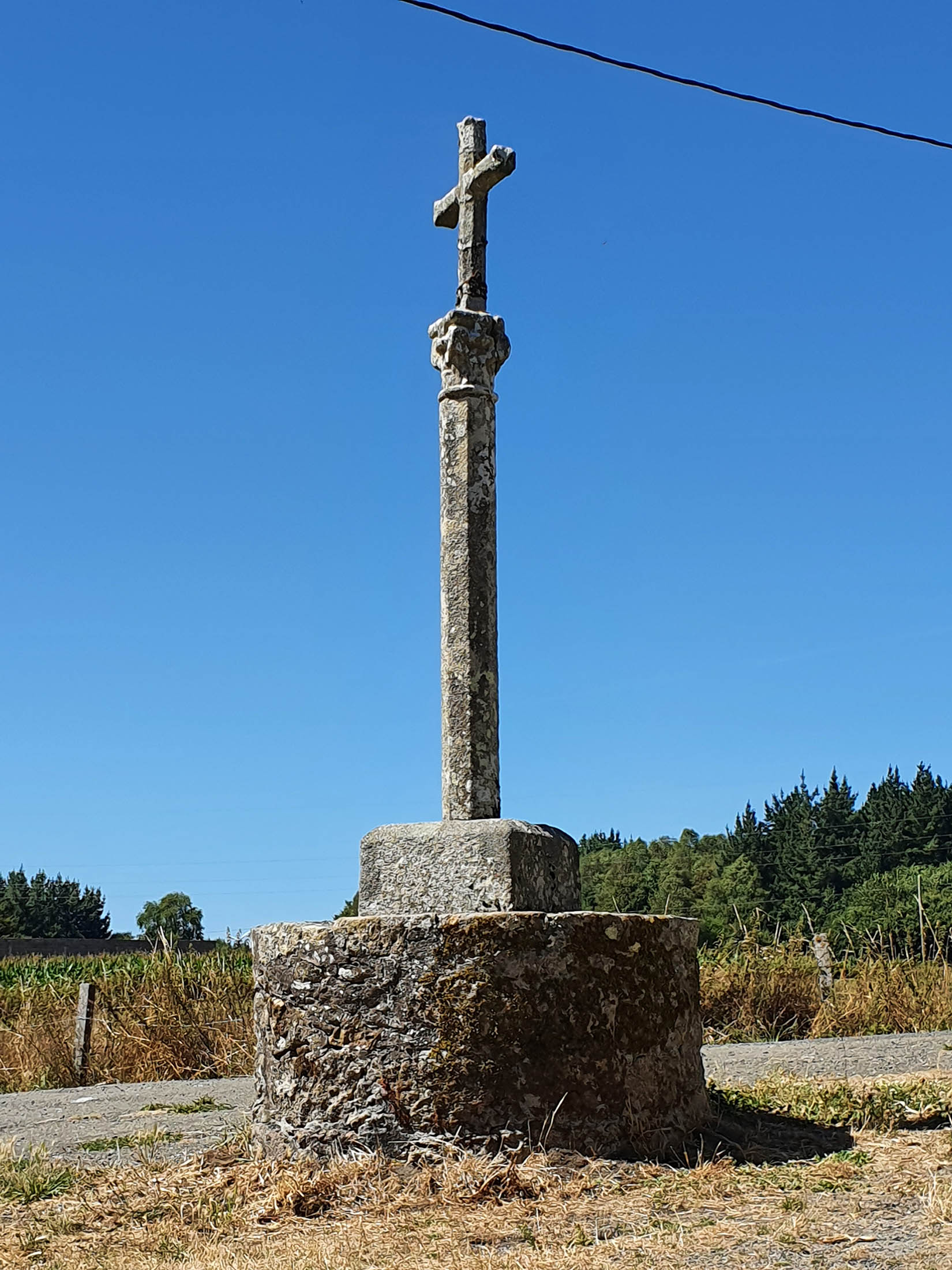 Lugar de Outeiro, da parroquia de Areas, no Concello de Antas de Ulla. Zona da Igrexa Parroquial e o campo da festa de Santa Cristina.